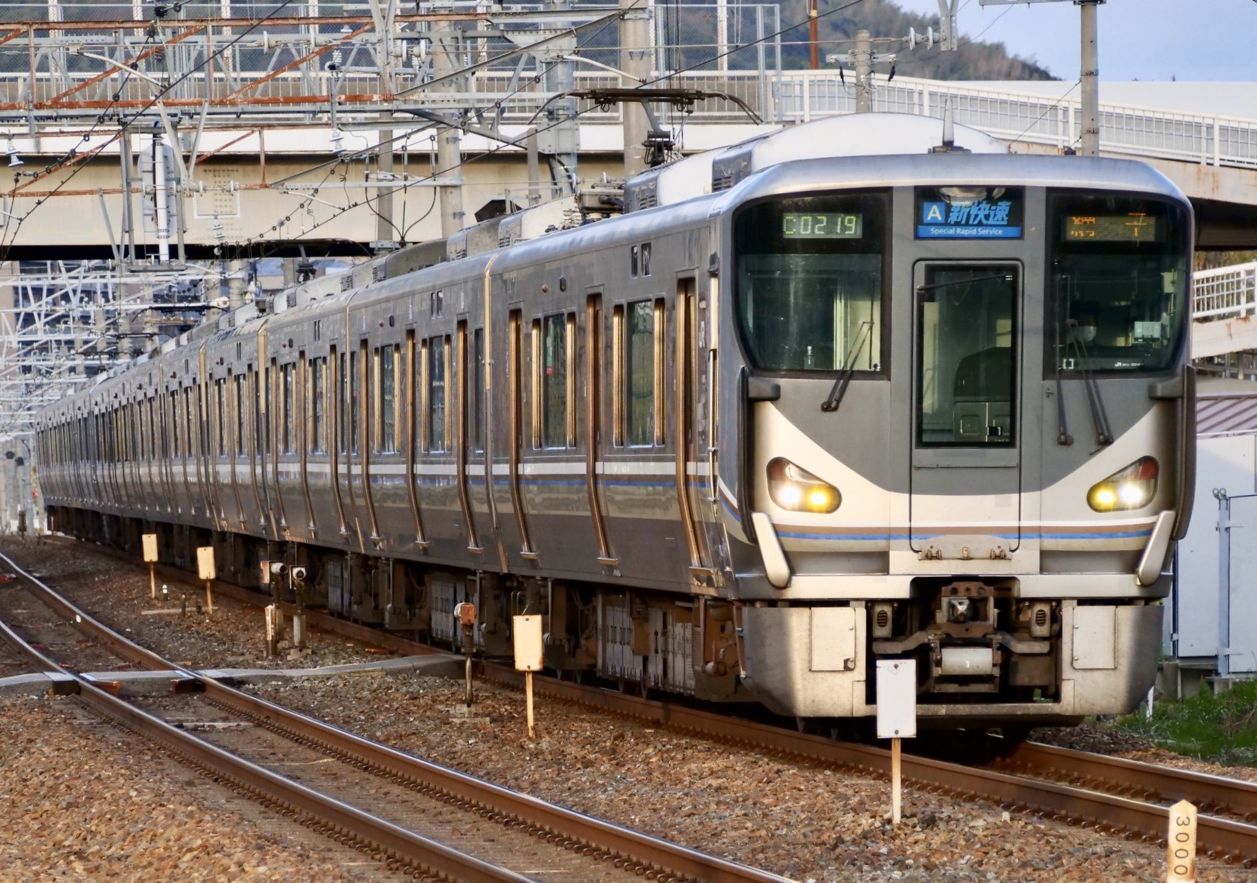 225系0番台I1編成 新快速網干行き JR京都線山崎-島本